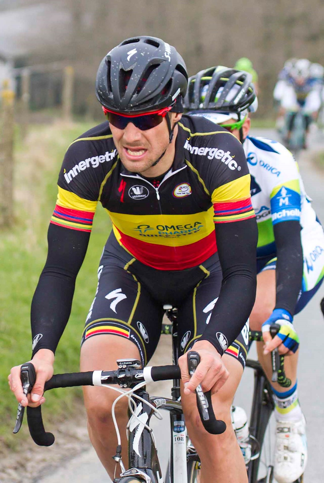 015 boonen kapelberg